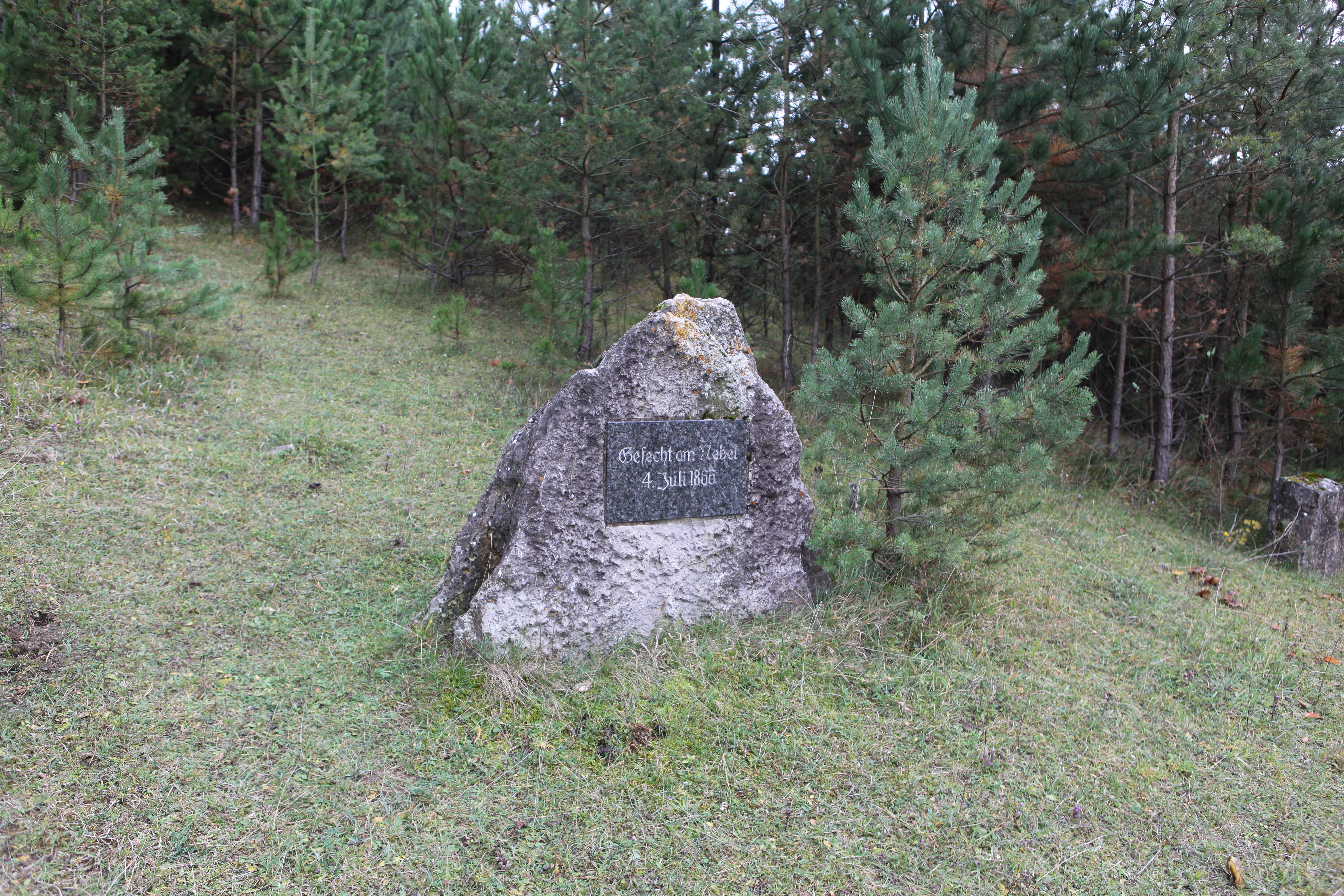 Gedenktafel am Nebelberg, die an ein Gefecht im Deutsch-Deutschen Krieges am 4. Juli 1866 erinnern soll